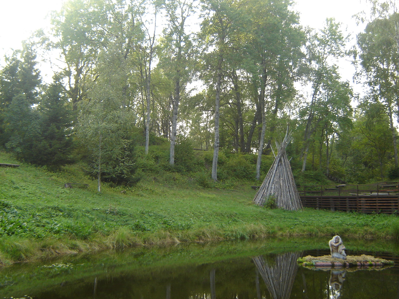 Linnamäe nõlv koos järvega